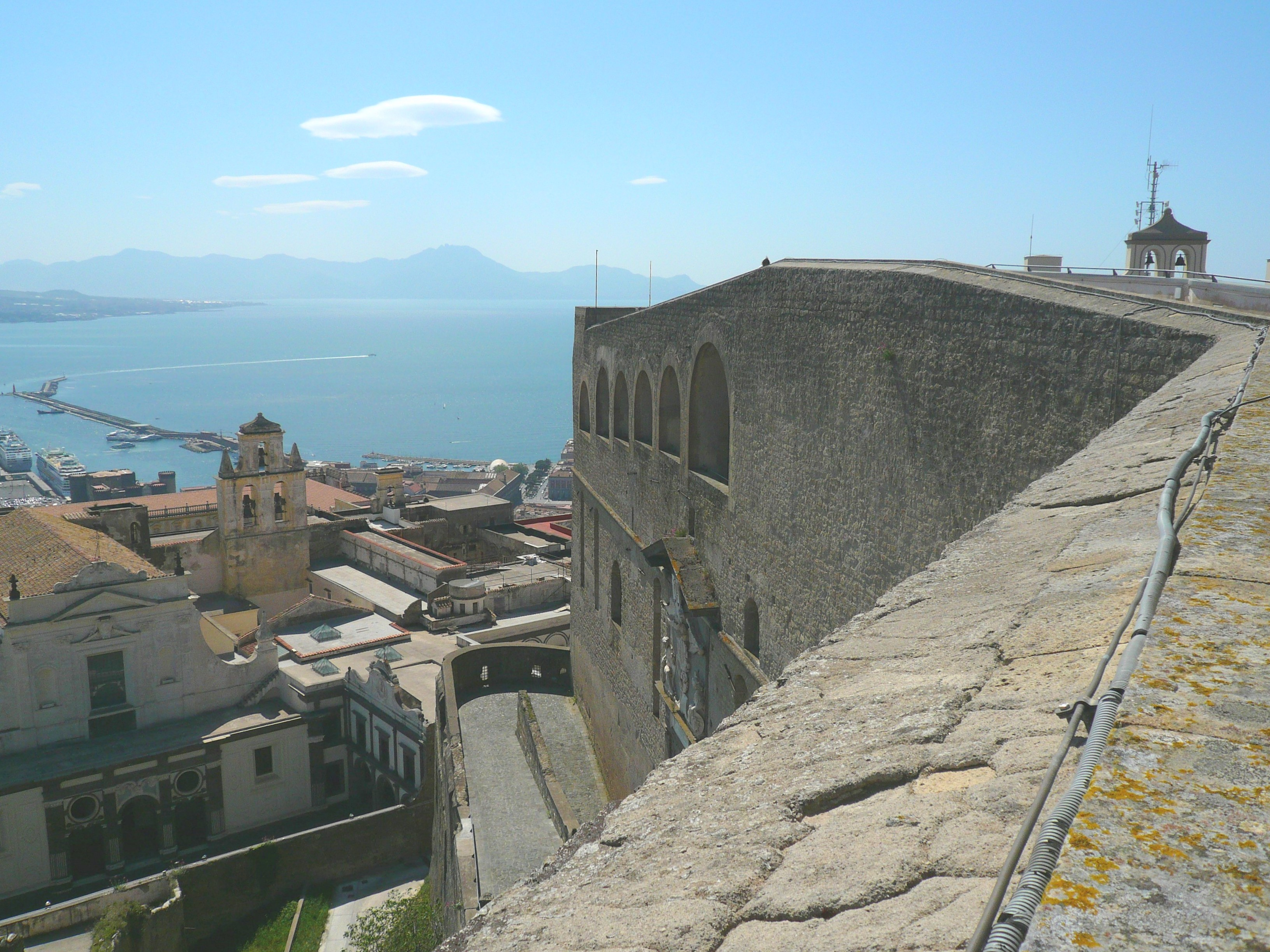 scorcio della facciata principale di Castel Sant'Elmo. Sullo sfondo la Penisola Sorrentina. Autore foto: Roberto De Martino